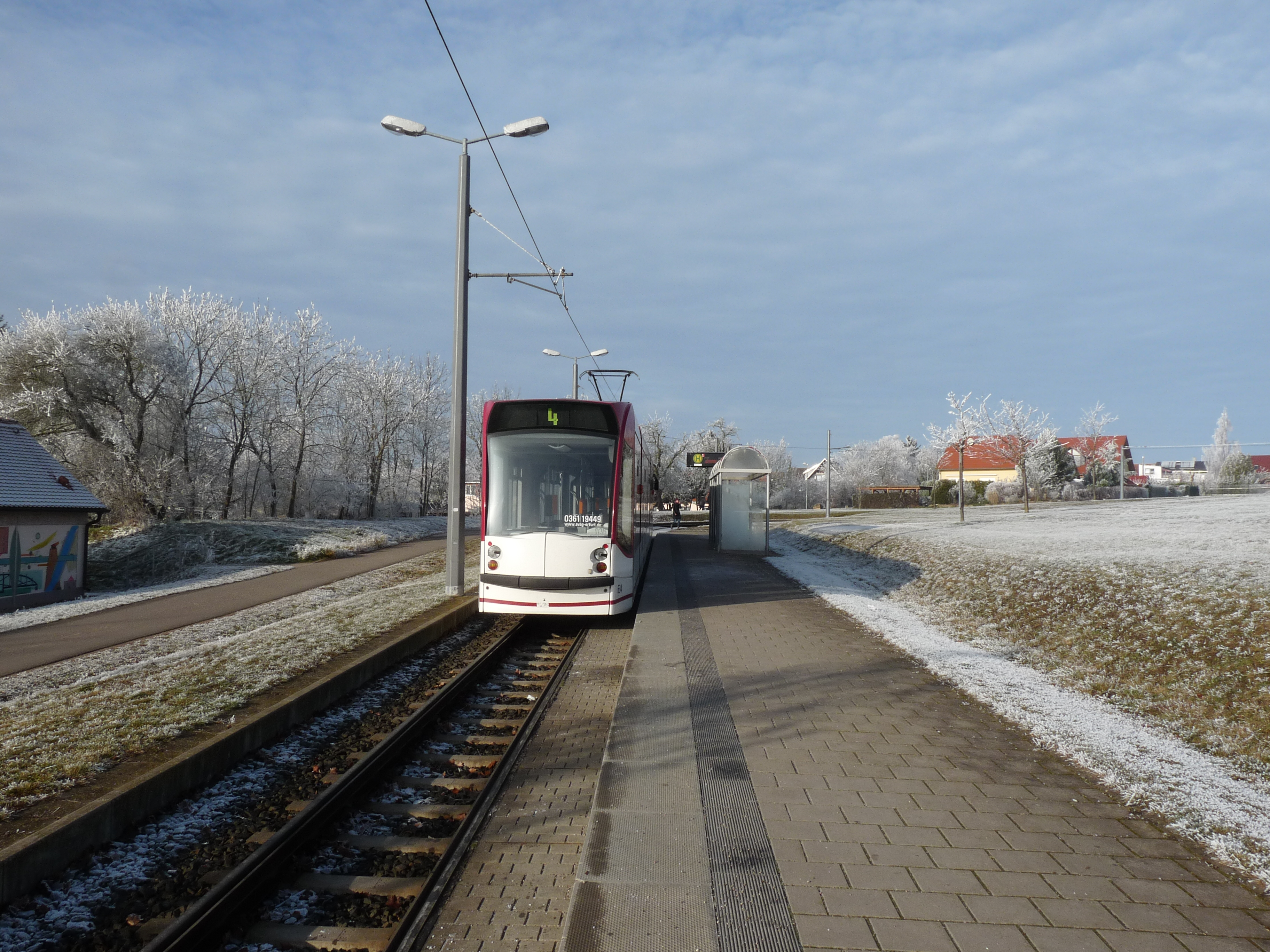 Het eindpunt van tramlijn 4 in Bindersleben